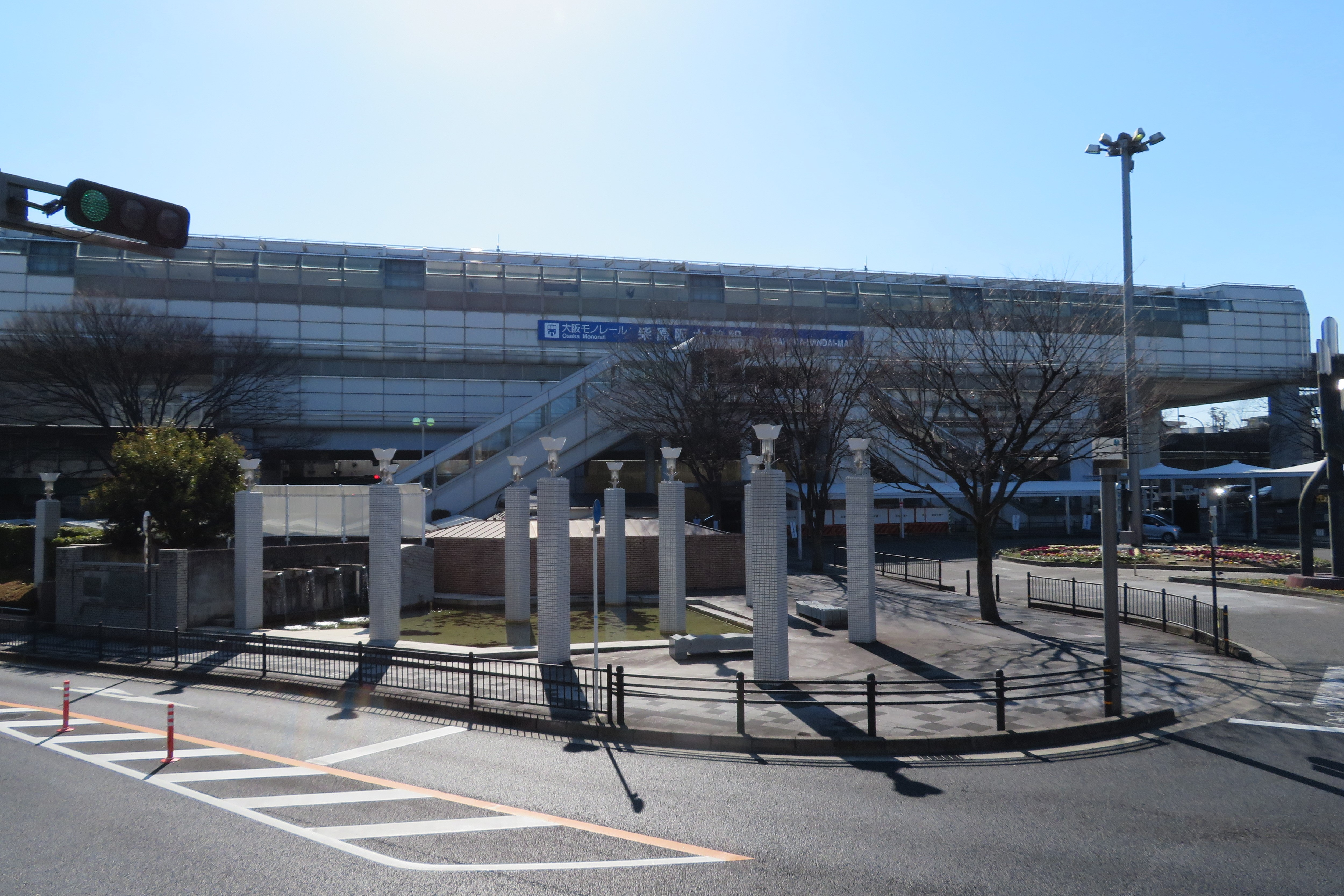 大阪モノレール柴原阪大前駅